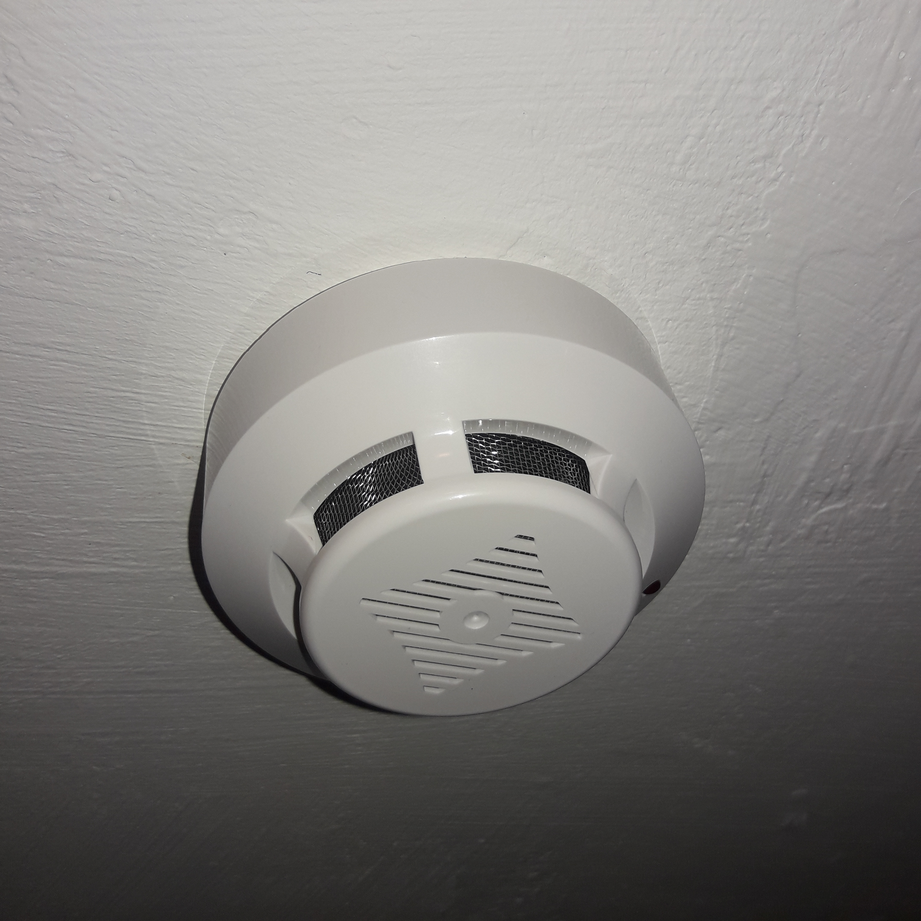 Автономный дымовой извещатель ИП 212-06 АРТОН-ИПД-3.4М